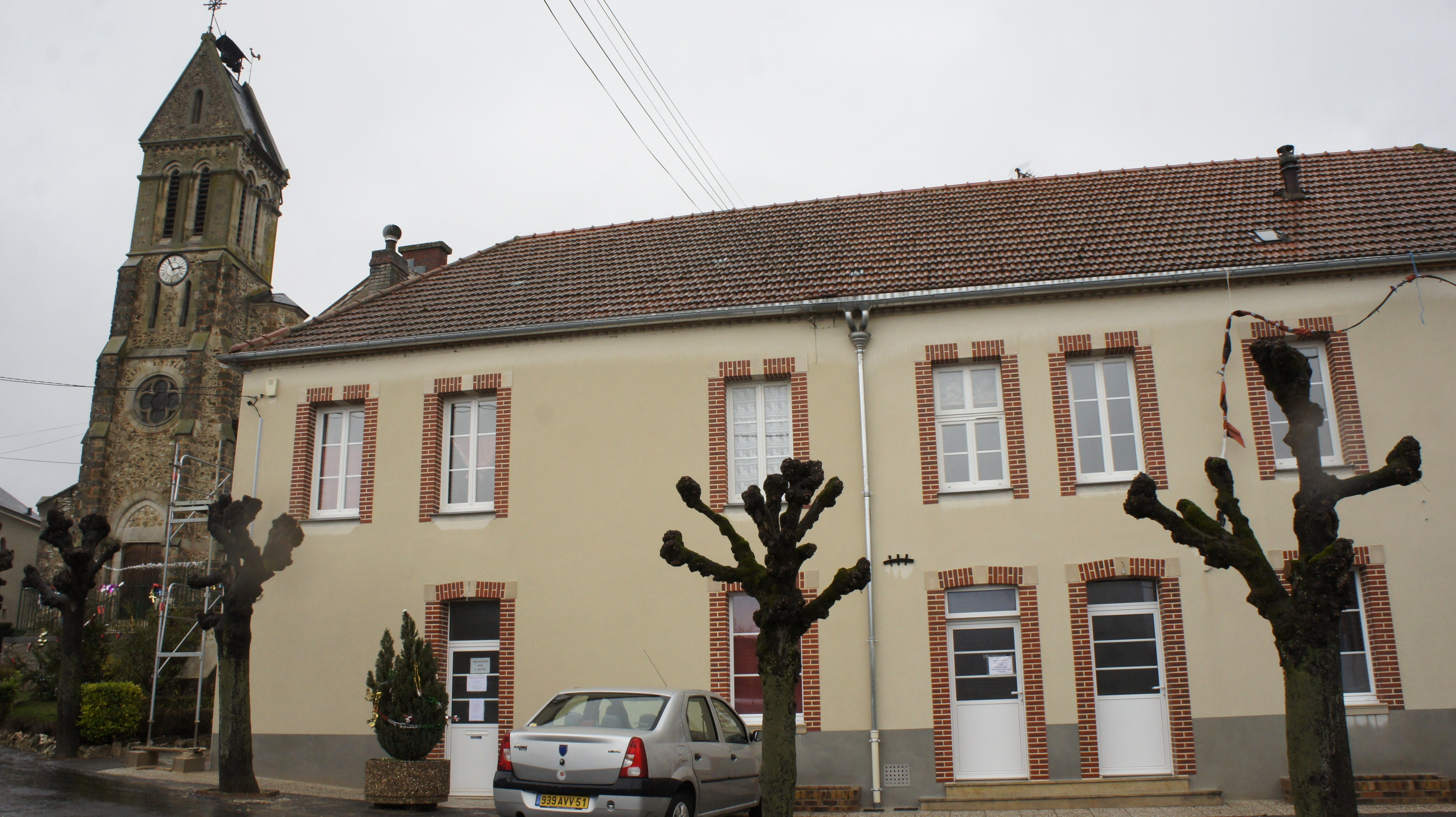 La Mairie_et l'église_de Moussy .